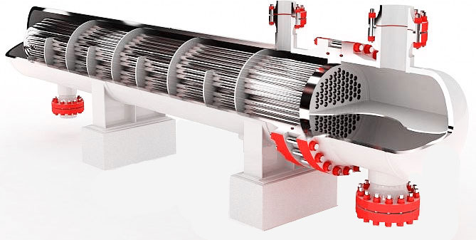 Общий вид